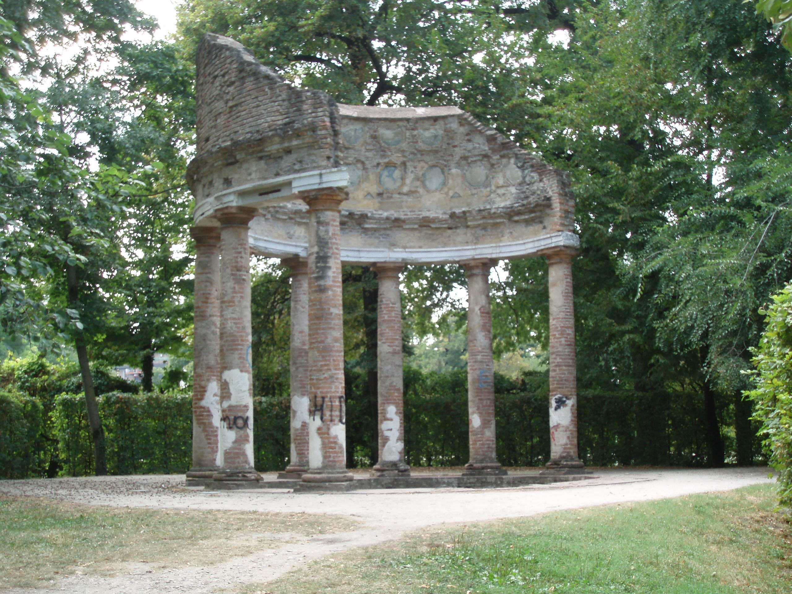 Parco Ducale This is a photo of a monument which is part of cultural heritage of Italy.